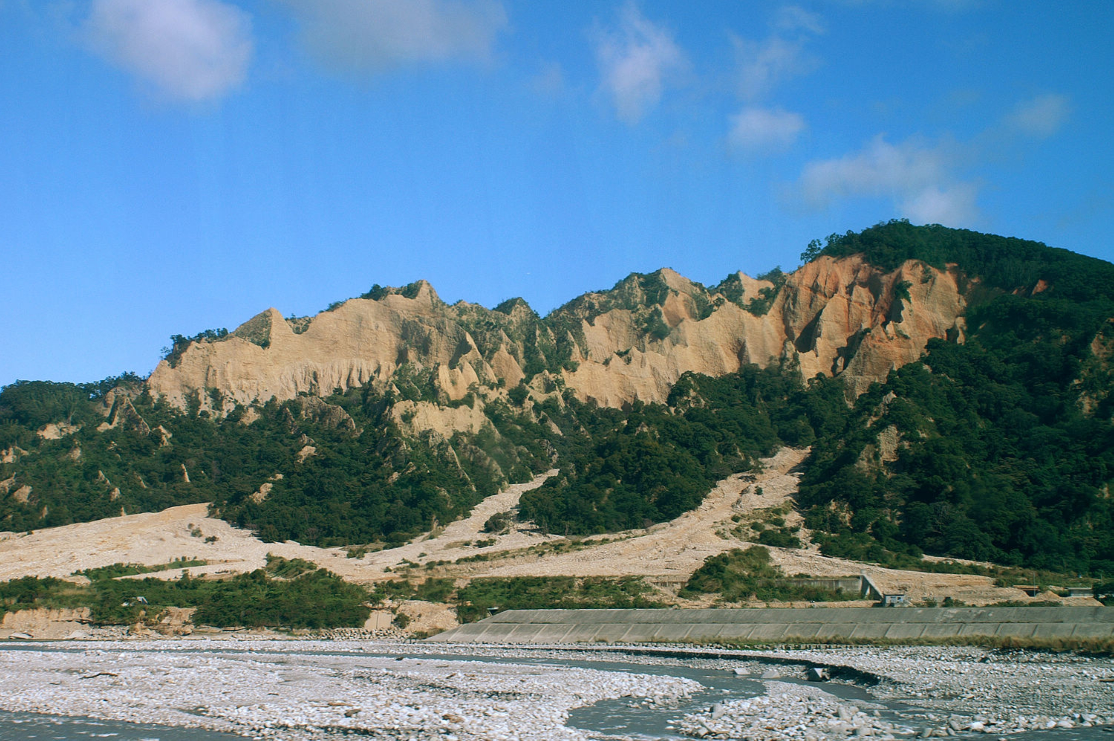 臺灣苗栗縣三義鄉火炎山。